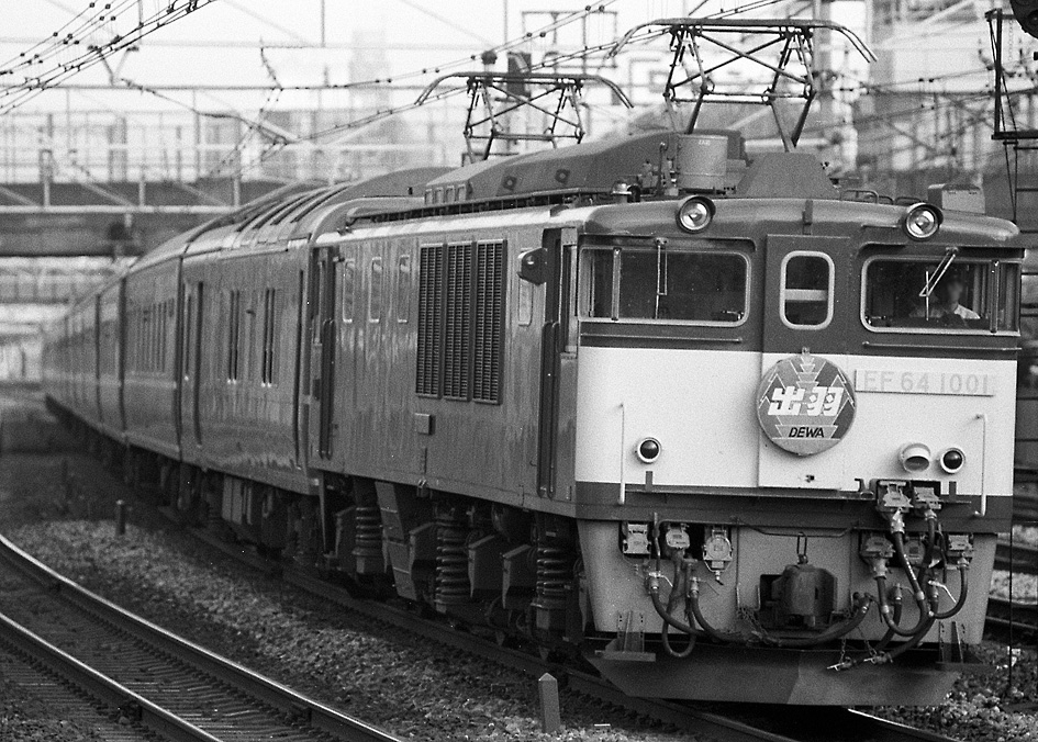 国鉄EF64 1001けん引 寝台特急出羽